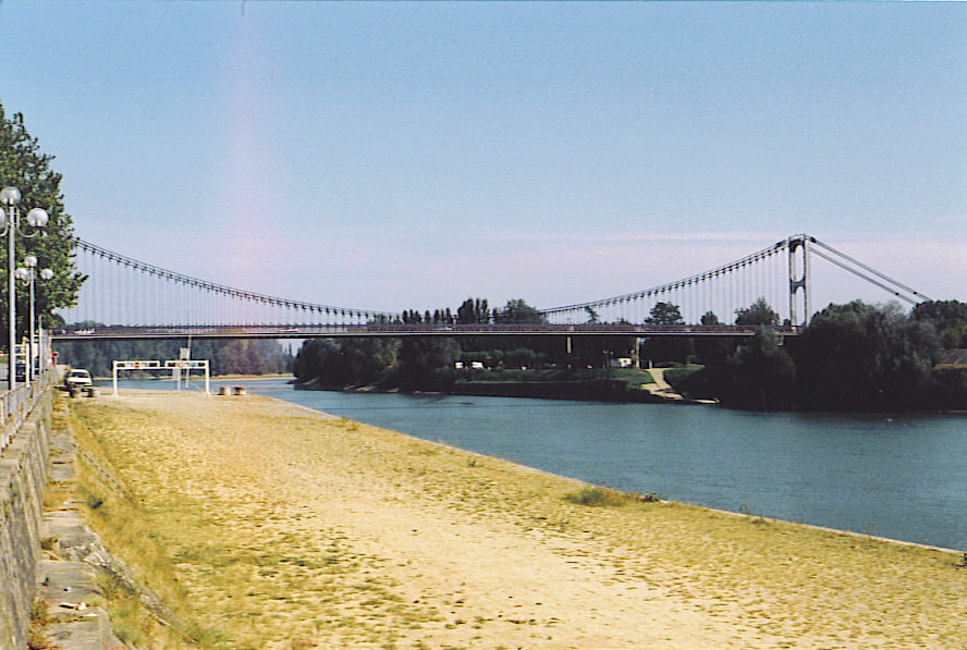 Pont suspendu à La Réole, Gironde. Bridge in La Réole, Gironde, France. self made